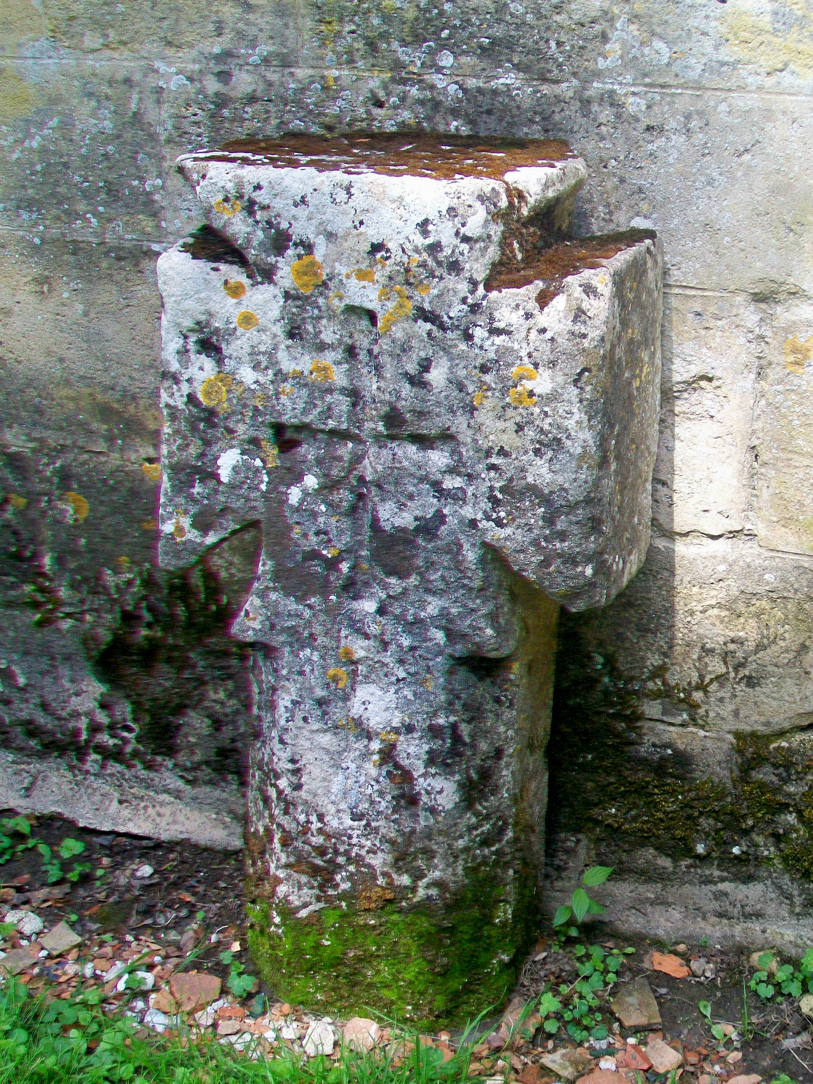 La croix de l'Ormeteau-Marie, croix pattée transféré devant la façade sud de l'église Notre-Dame.